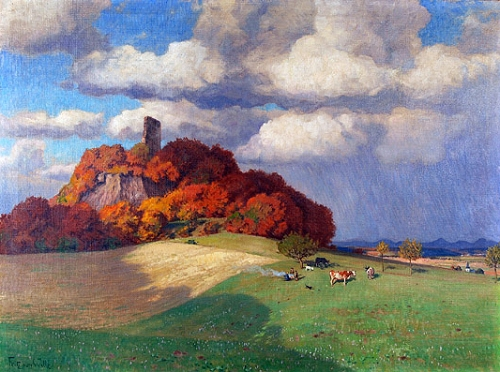 Die Tomburg mit Blick auf Wormersdorf und das Siebengebirge. Öl auf Leinwand, 90 x 120 cm. Signiert »Fritz von Wille«